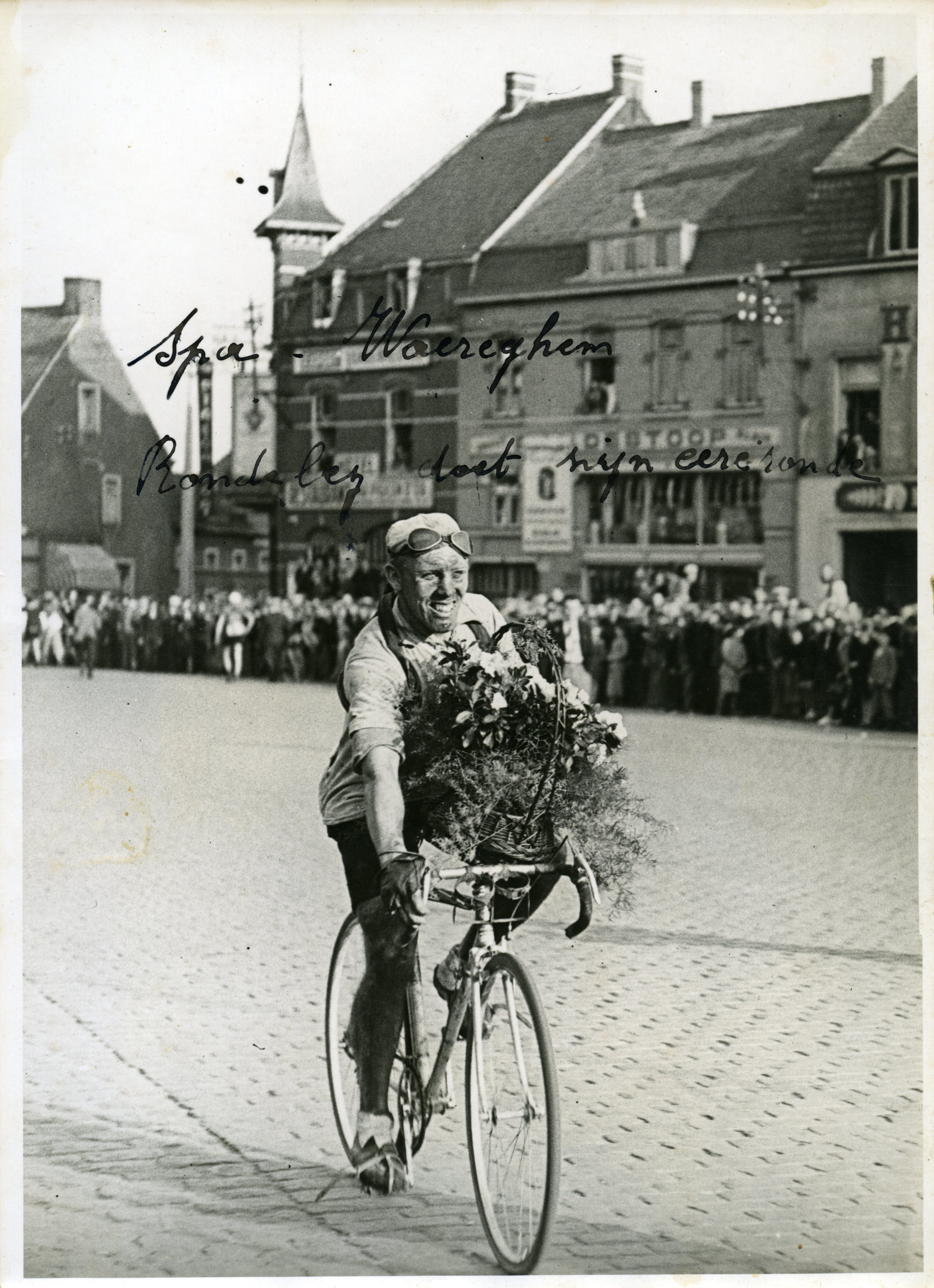 In het centrum van Waregem wint Florent Rondelé makkelijk voor Van Kerckhoven. Andre Rosseel wordt vierde. Rosseel (met gitzwarte haren) was een dag eerder al tweede geworden en wordt zo eindwinnaar van Dwars door België 1948.